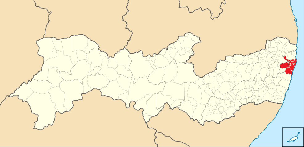 Microrregião de Recife